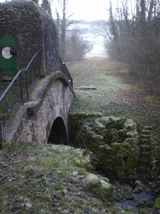 Chierry - Siphon de la Dhuis au niveau du Bois Pierre - Aqueduc de la Dhuis.